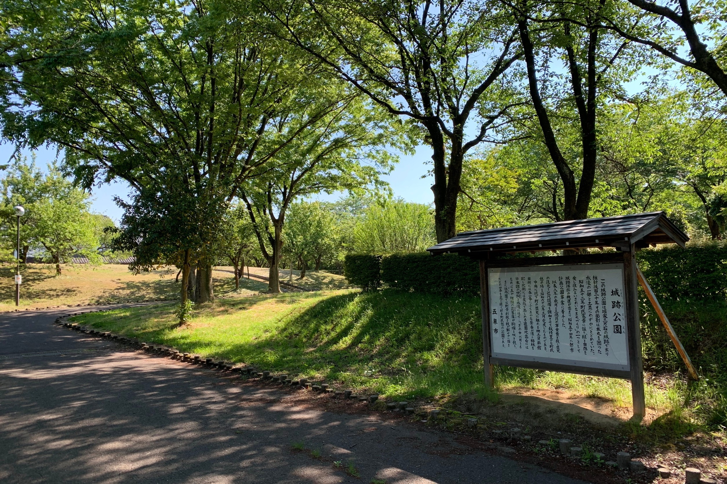 村松城城跡公園（2020年5月）